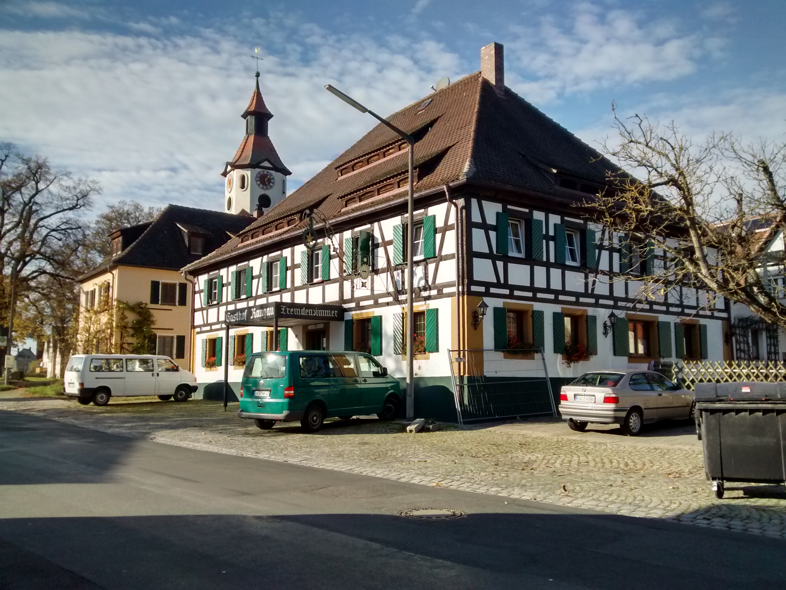 Denkmalgeschützter Gasthof Rangau in Linden, Markt Erlbach